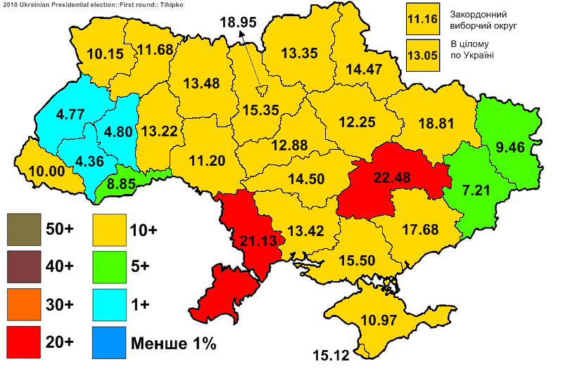 Електоральна підтримка Тігіпка Сергія Леонідовича на виборах Президента України 2010. Перший тур.